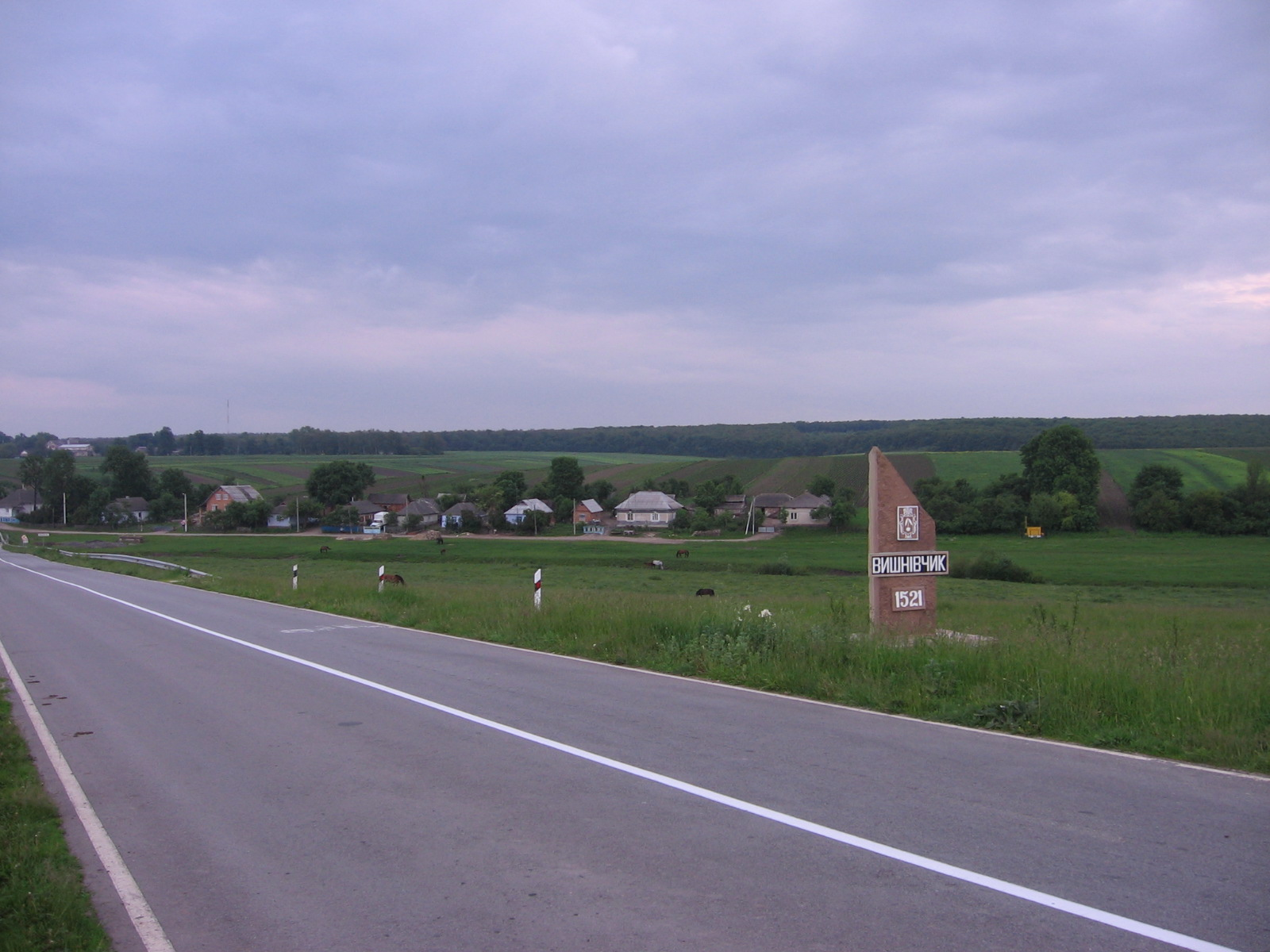 Wjazd do miejscowości Wiśniowczyk (Вишнівчик)